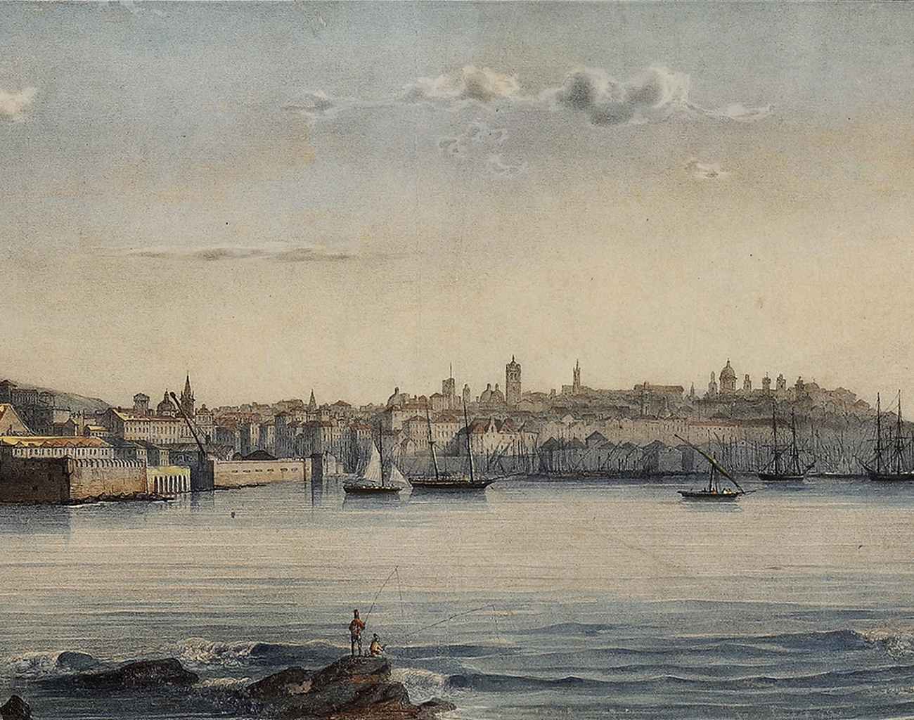 La Ripa Maris di Genova tra il 1828 e il 1848